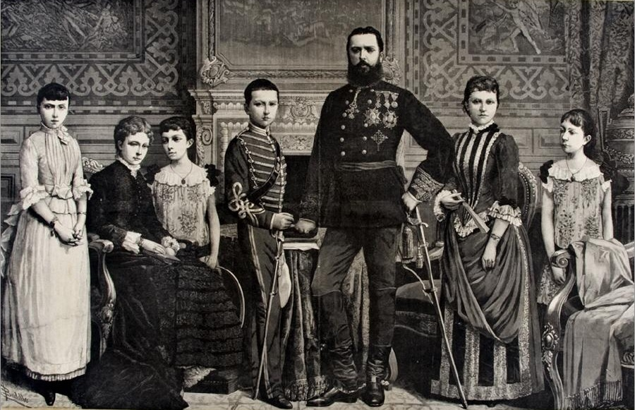 Retrato de don Carlos María Isidro de Borbón y Austria-Este, conocido como Carlos VII, aspirante carlista al trono de España y jefe del partido tradicionalista, con su esposa doña Margarita de Borbón-Parma y los infantes. De izquierda a derecha: doña Elvira, doña Margarita, doña Alicia, don Jaime, don Carlos, doña Blanca y doña Beatriz. El grupo se presenta en un salón con chimenea, de paredes ricamente decoradas. Padre e hijo visten uniformes militares, mientras que Margarita y sus hijas visten con sencillez, con ropa de diario.